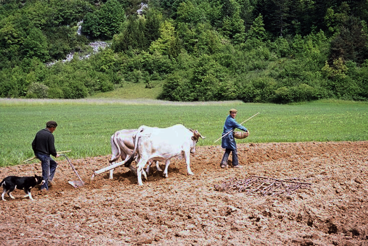 Photographie par Roland Darré de vaches lourdaises au travail dans une vallée pyrénéenne